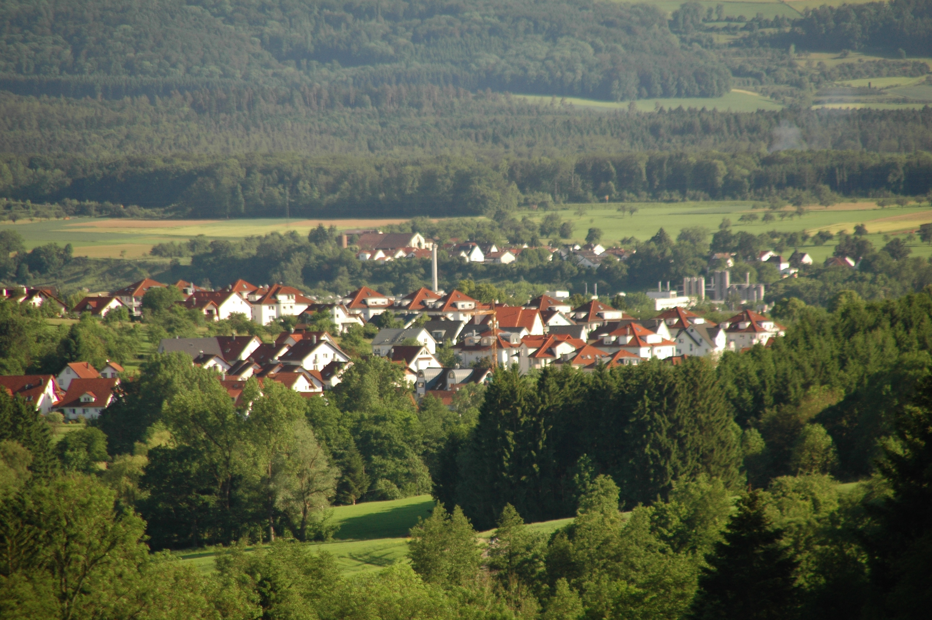 Ausblick vom Wannenhof nach Eislingen